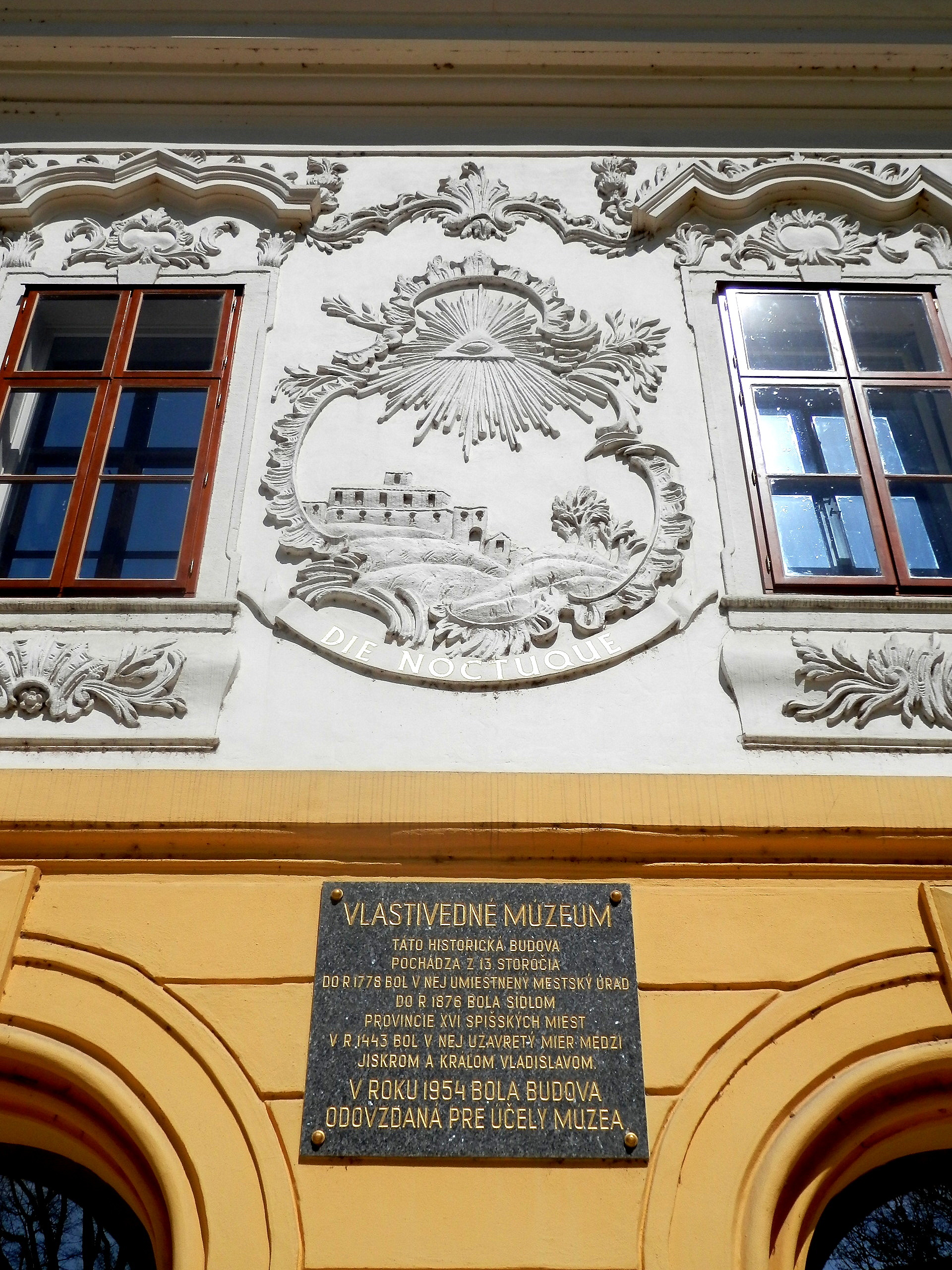 Detail priečelia. Rokoková budova Župného domu (provinčný dom) bola postavená v 13. storočí. Od roku 1954 má v ňom svoje expozície Múzeum Spiša. Budova je vedená v zozname národných kultúrnych pamiatok SR. Ulica Letná číslo 50. Mesto Spišská Nová Ves.